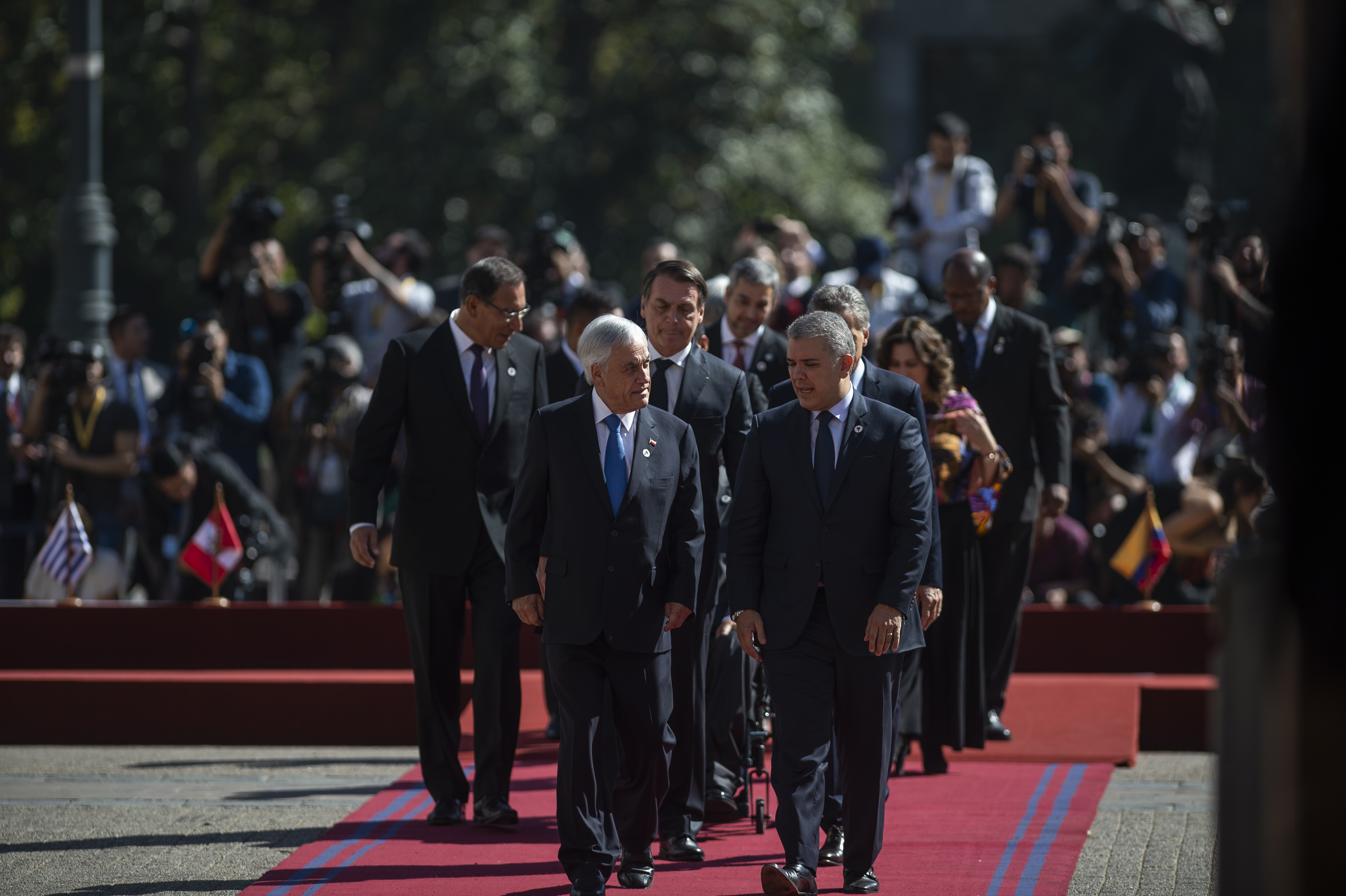 Encuentro de Presidentes de América del Sur, marzo de 2019.